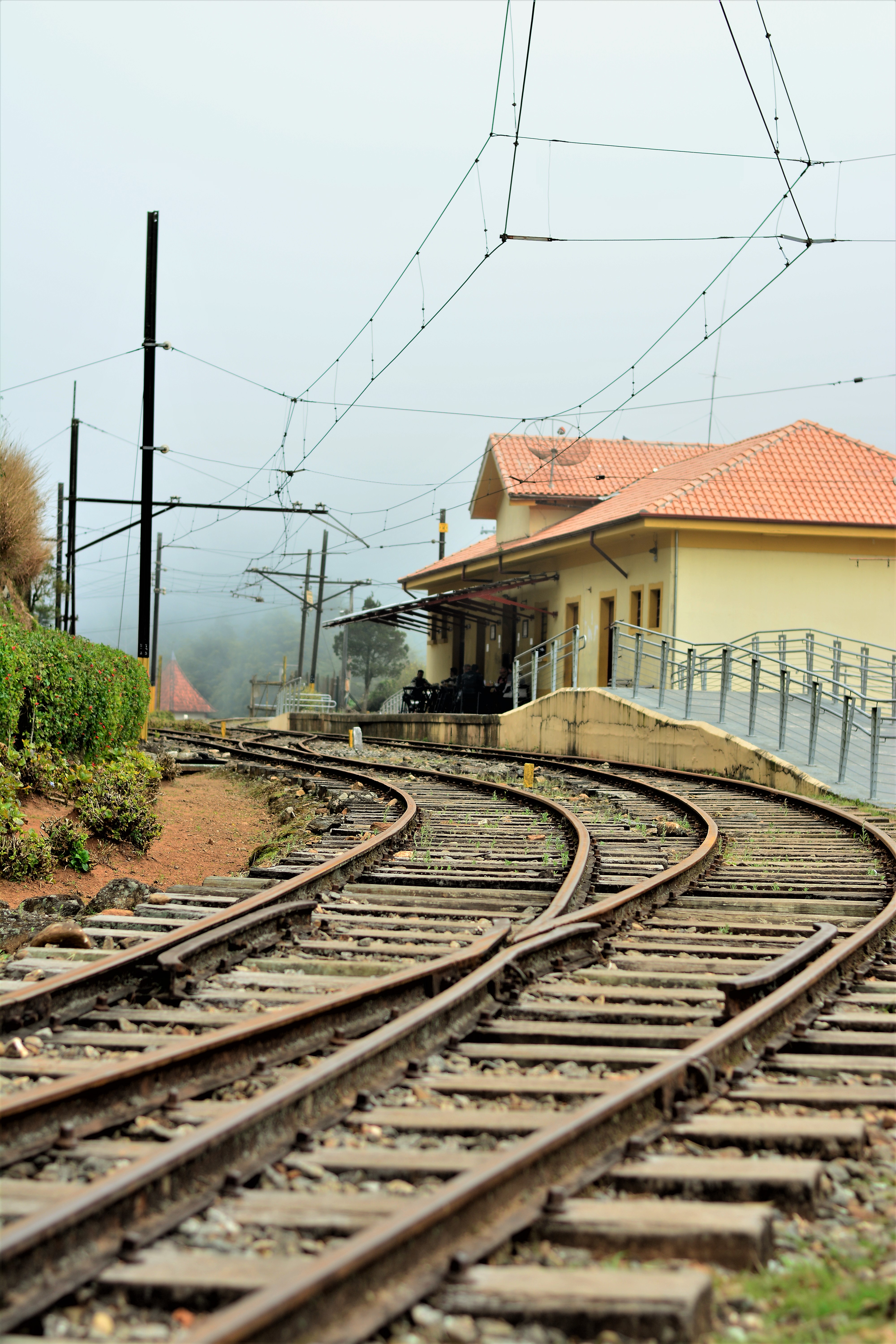 Trilhos de trem da estação turistica da cidade Santo Antonio do Pinhal